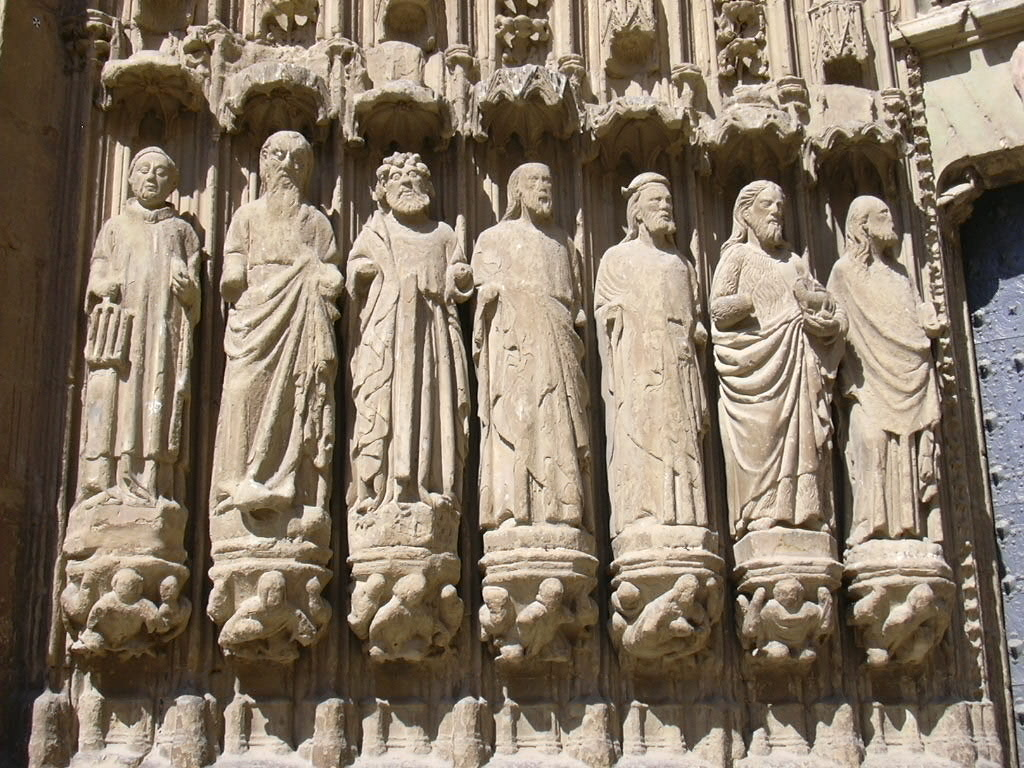 Huesca - Detalle de la portada de la catedral